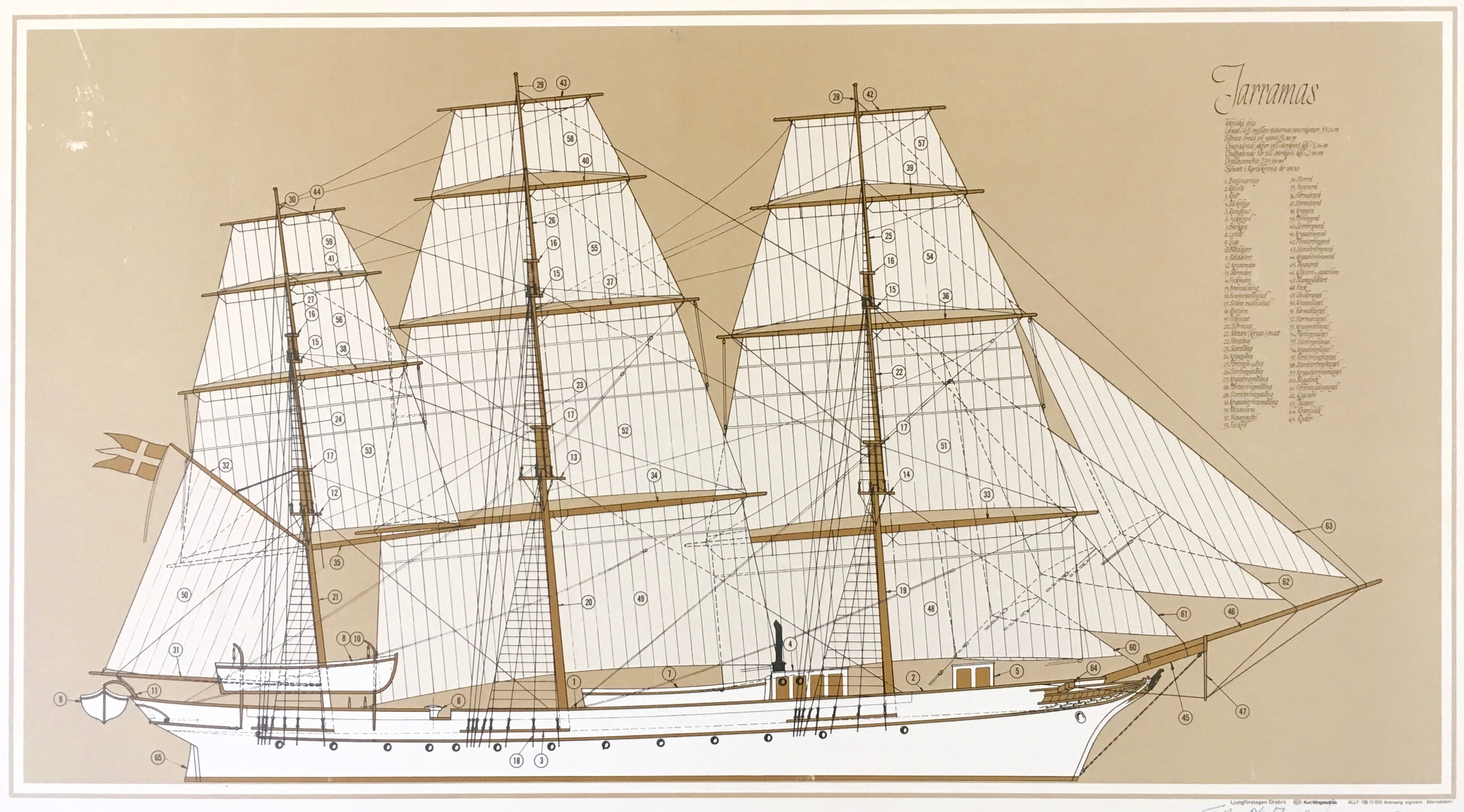 HMS Jarramas, byggd 1900, skiss. Marinstaben 1971.